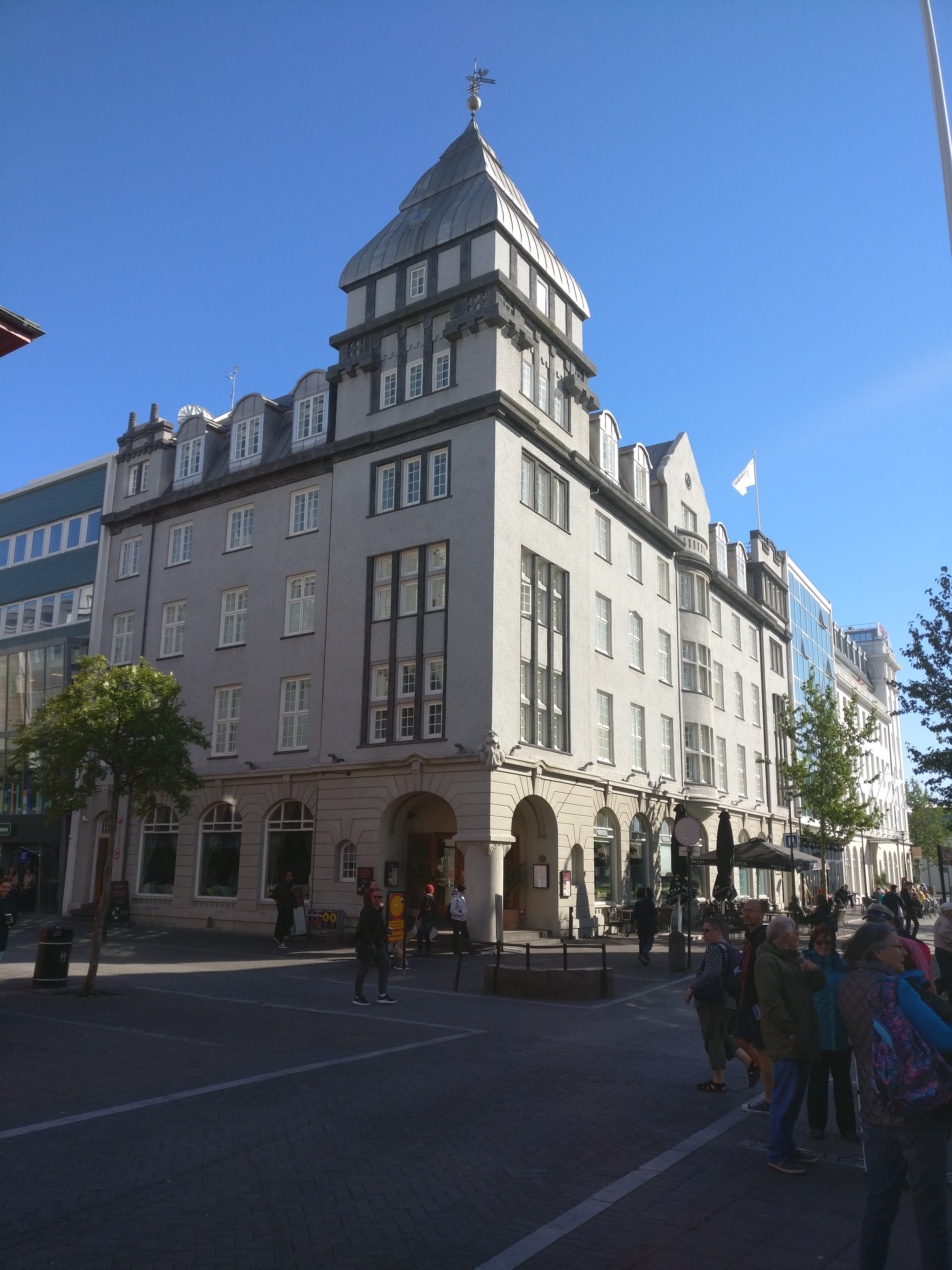 Reykjavík - Austurstræti 16